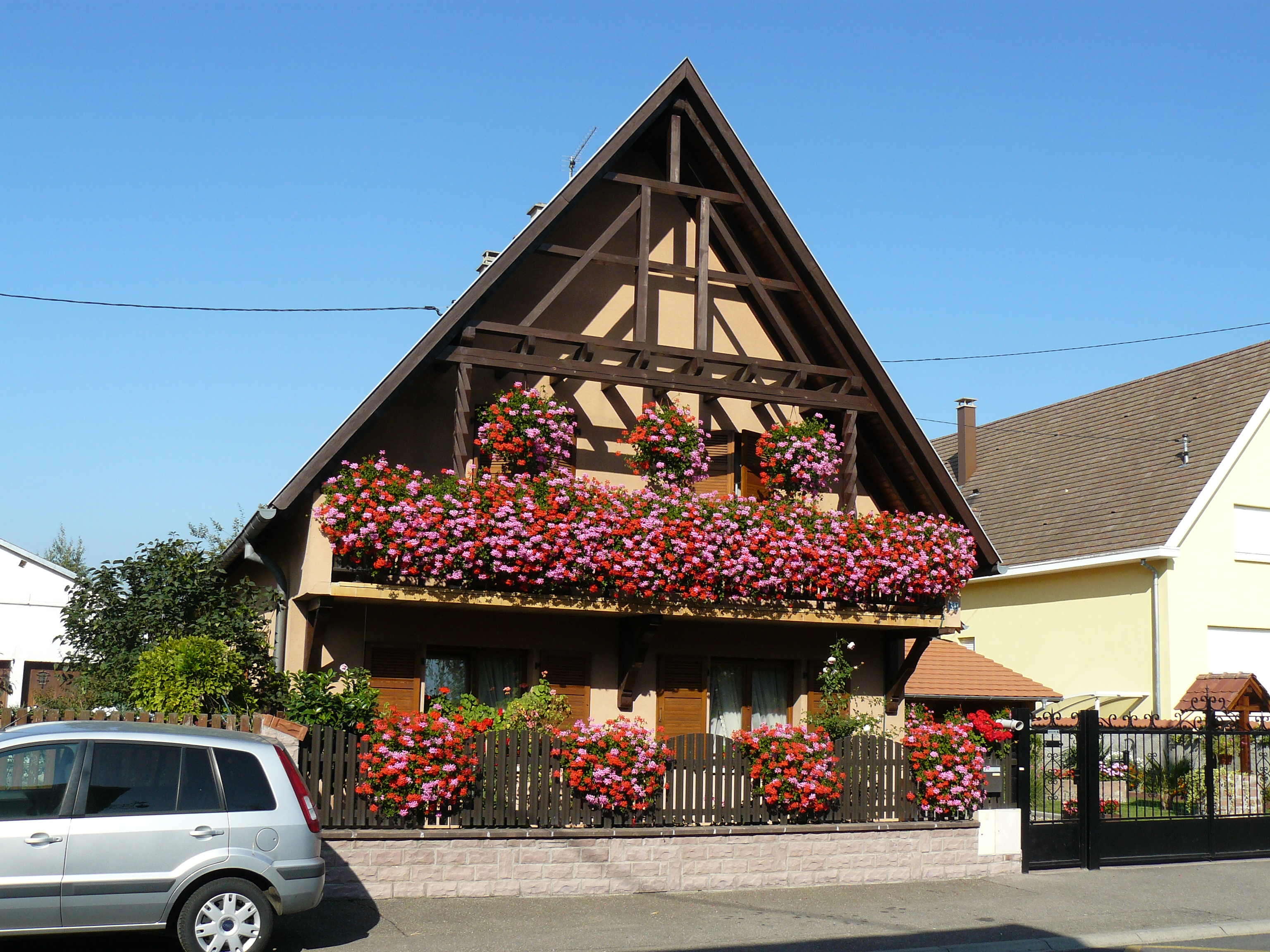 Maison à colombage magnifiquement fleurie